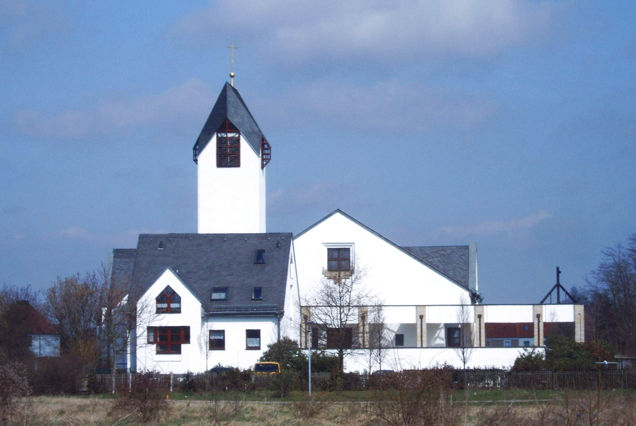 St.-Josef-Kirche, Magdeburg, Deutschland Bild aufgenommen am 15.4.2006